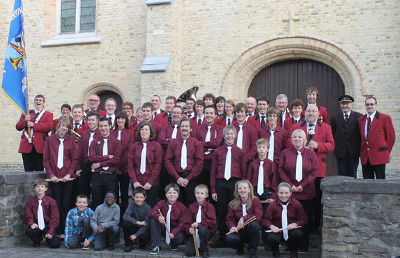 Groepsfoto genomen ter ere van het 65 jarig bestaan van onze harmonie.